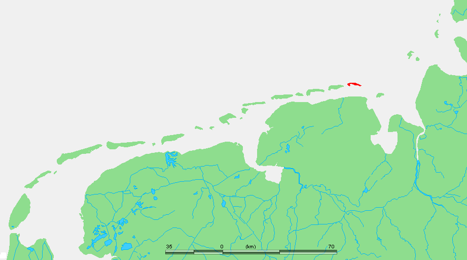 Wadden - Wangerooge.PNG